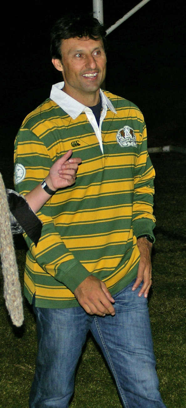 Laurie Daley